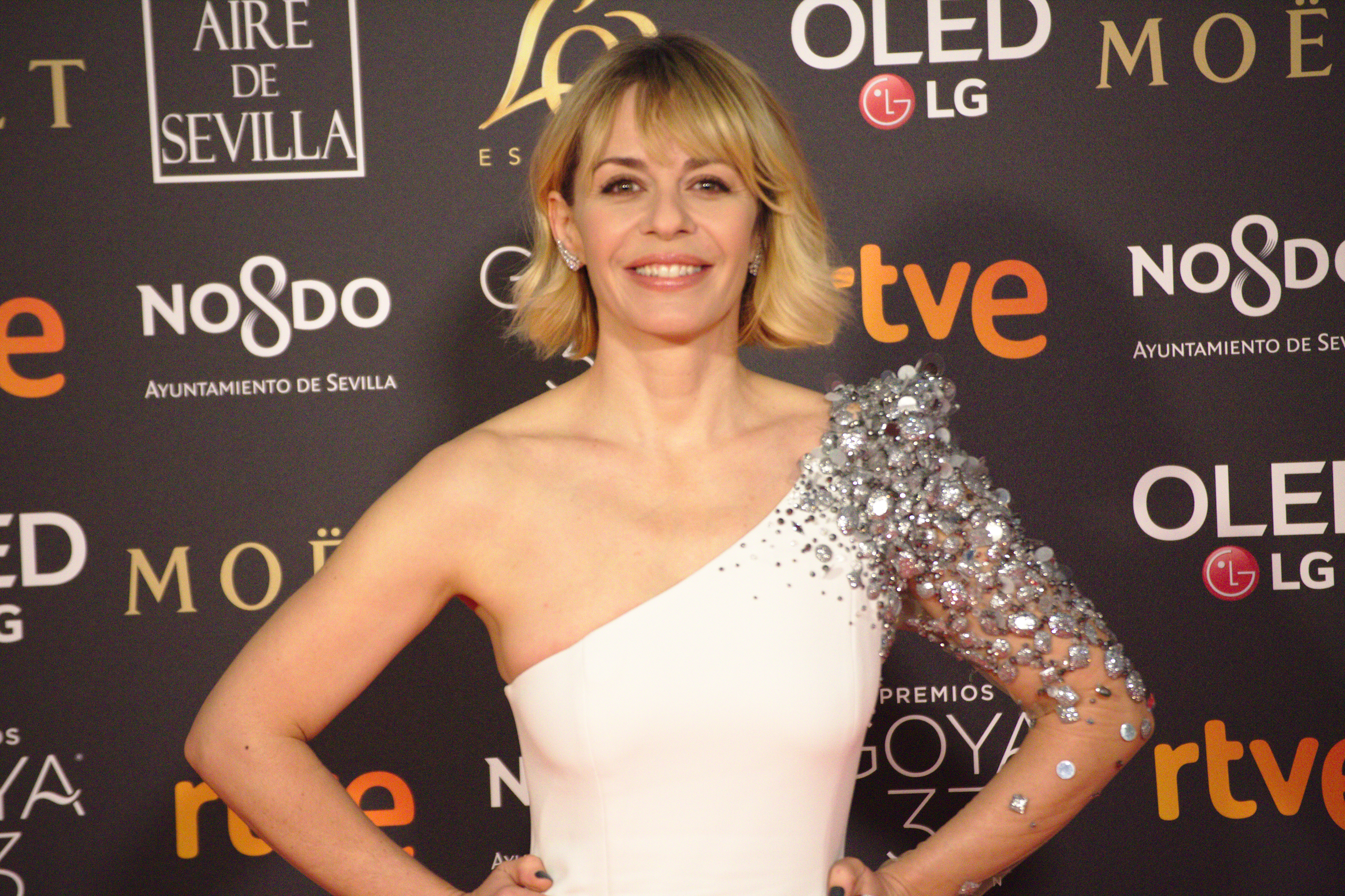 Maria Adanez en la alfombra roja de los Premios Goya celebrados en Sevilla en Febrero 2019